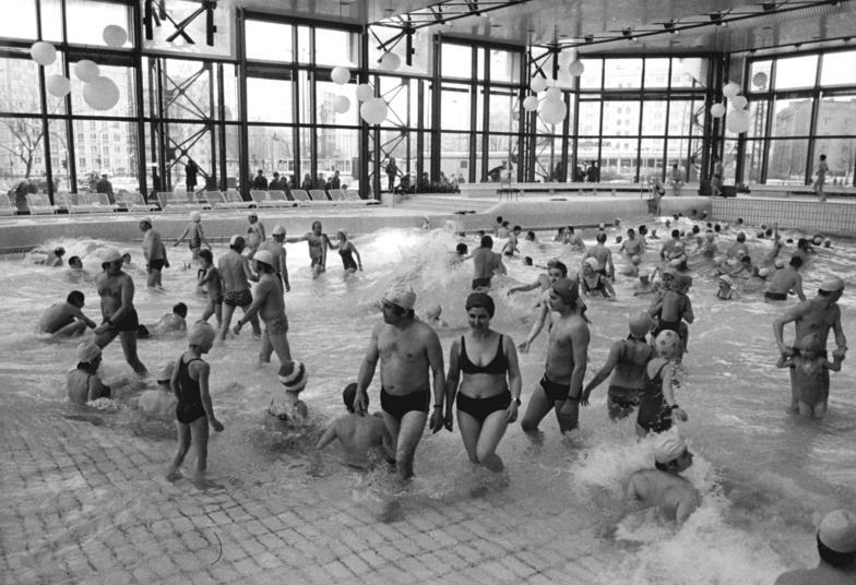 ADN-ZB Link 18.3.81 Berlin: Das Sport- und Erholungszentrum in der Leninallee wurde am 20.3.81 eröffnet und von der Bevölkerung in Besitz genommen. Blick in das Wellenbad.